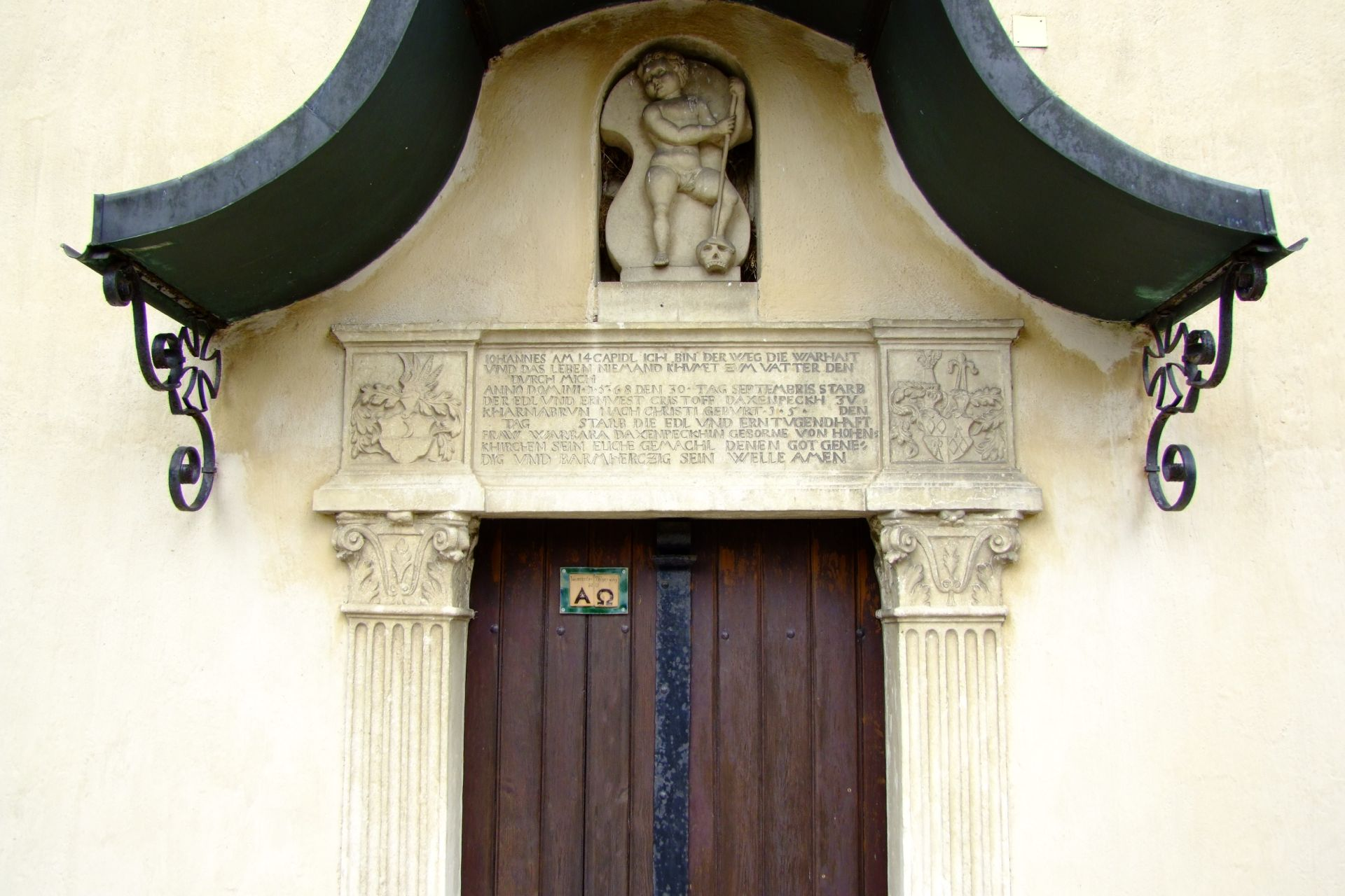 Kath. Filialkirche hll. Petrus und Paulus